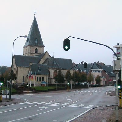 farita dum loka Esperanto-renkontiĝo